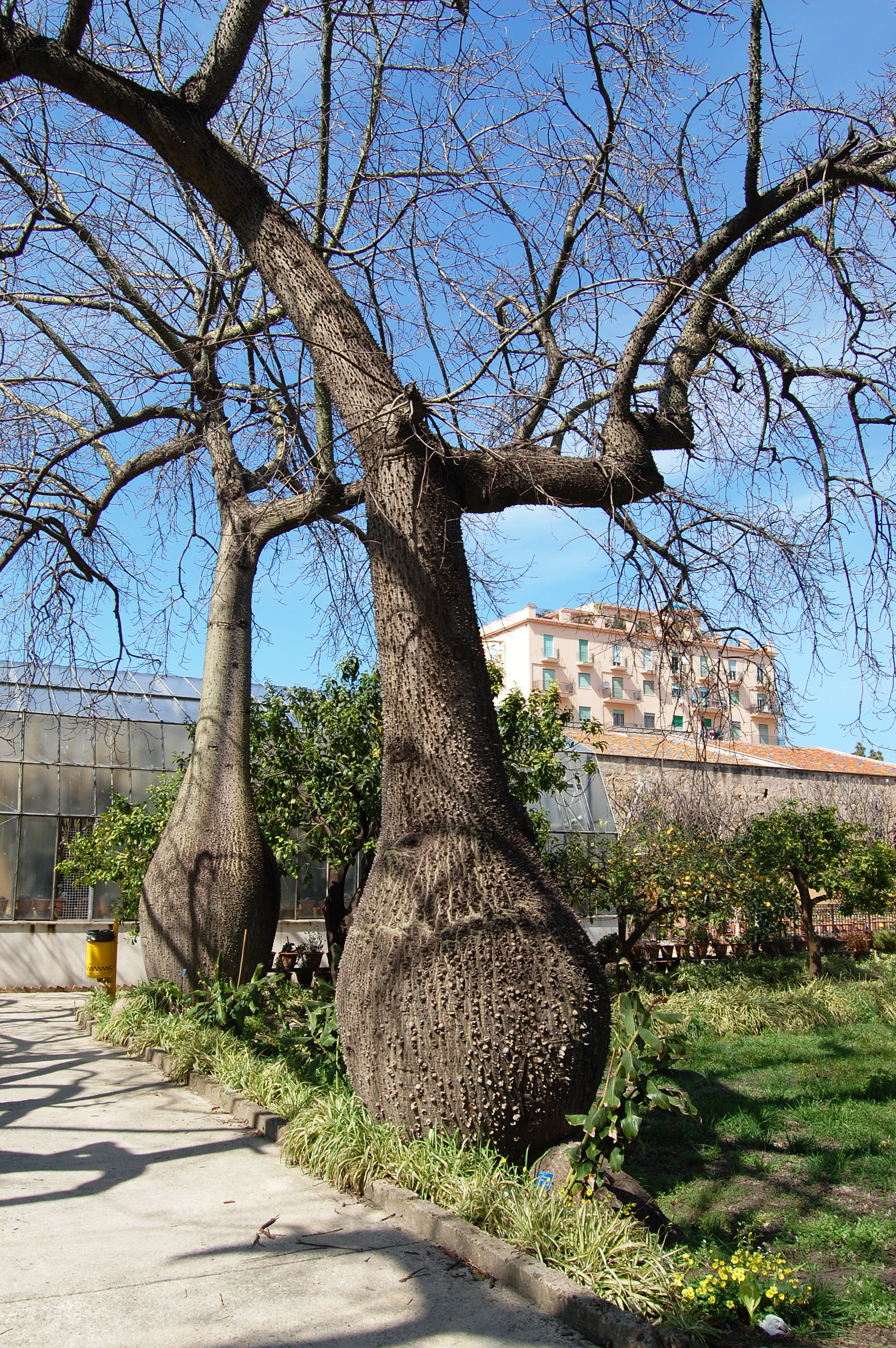 Ceiba speciosa (sin.=Chorisia speciosa)Orto botanico di Palermo